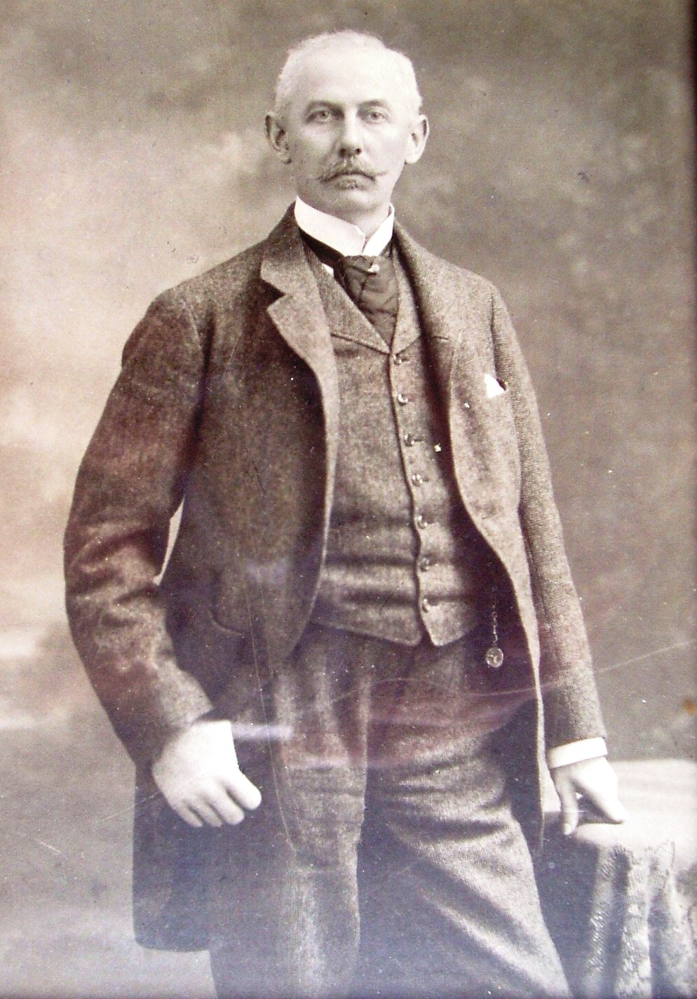 Paul Andreae, Kölner Unternehmer